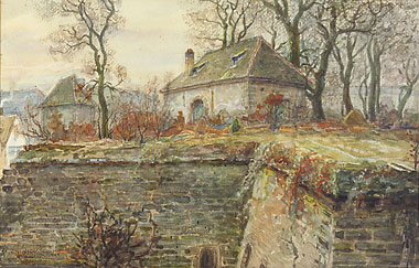 August Croissant, letzter Wallrest der Festung Landau (Pfalz)title QS:P1476,de:"August Croissant, letzter Wallrest der Festung Landau (Pfalz)" label QS:Lde,"August Croissant, letzter Wallrest der Festung Landau (Pfalz)"